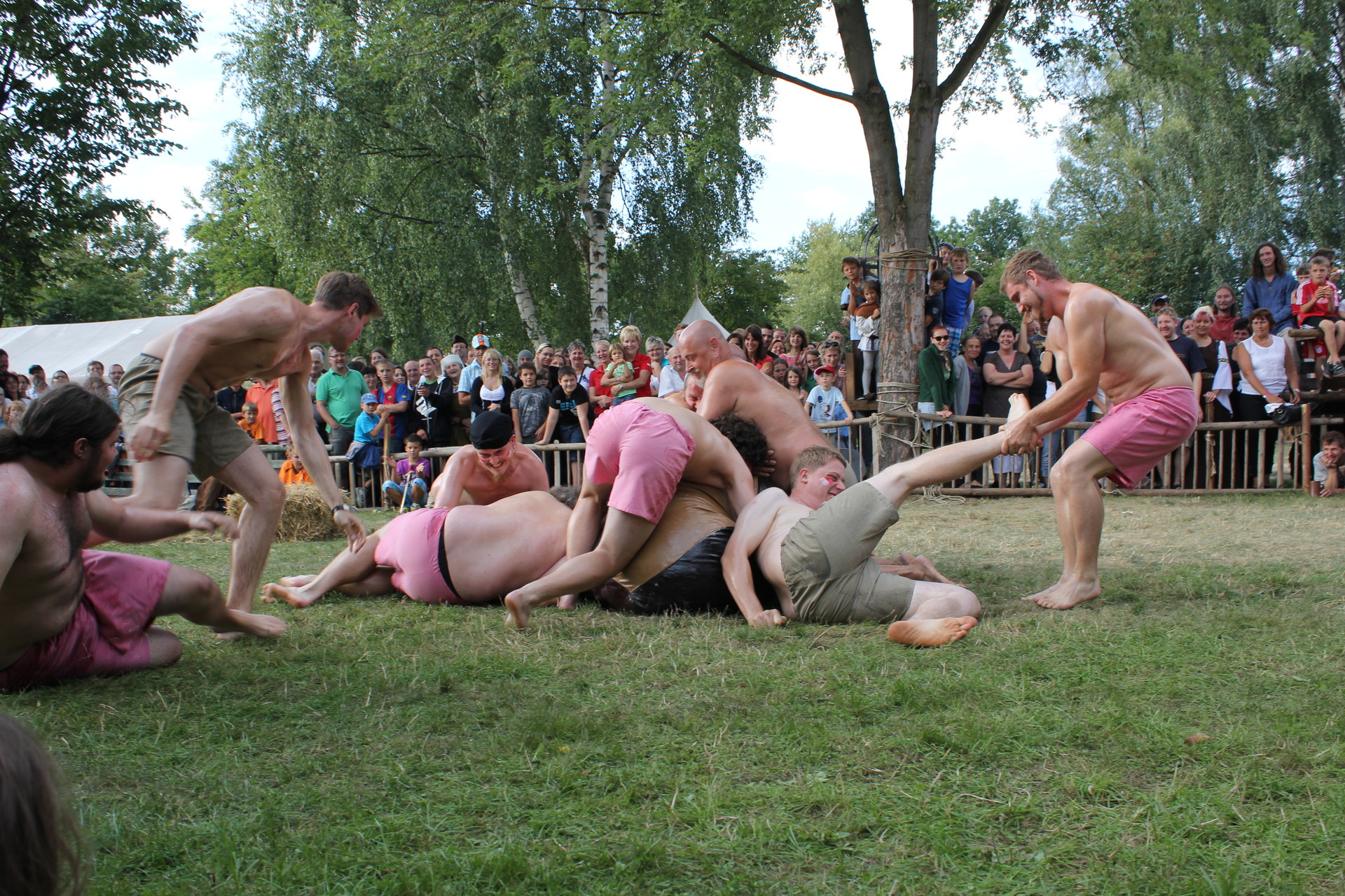 Bruchenball Spiel im Gange